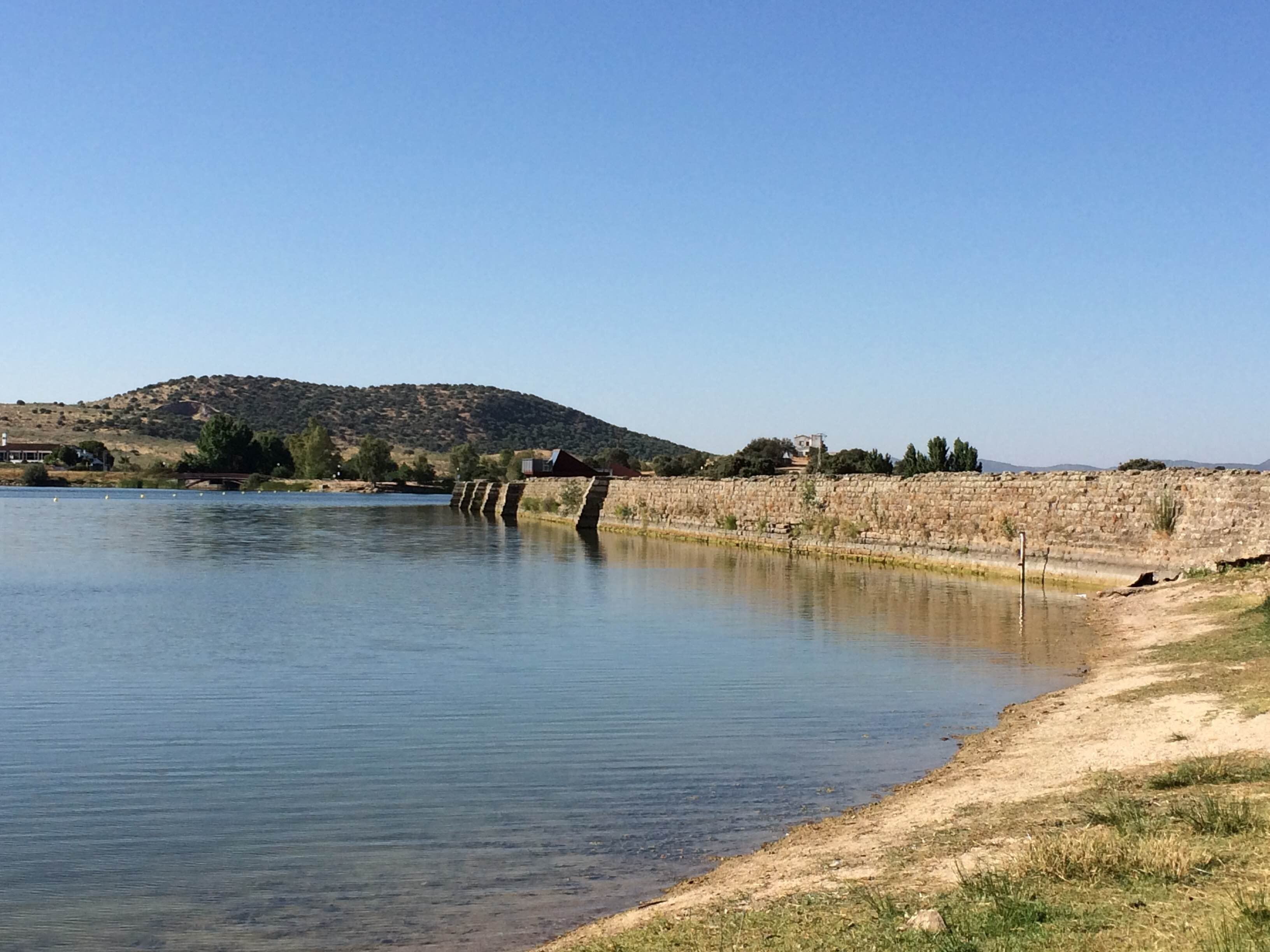 Embalse de Proserpina, Mérida (2015).